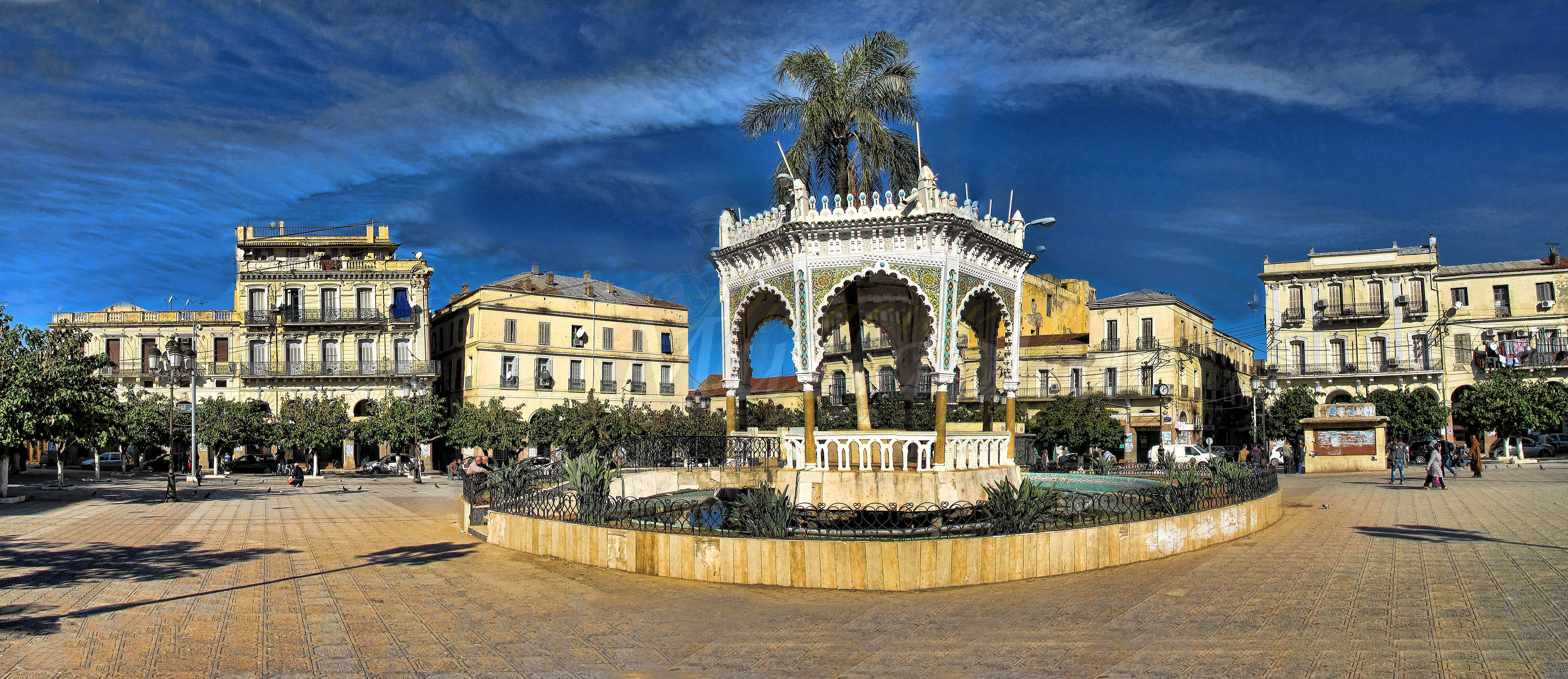 Centre de Blida (Algérie), place du 1er Novembre (Place Toute).